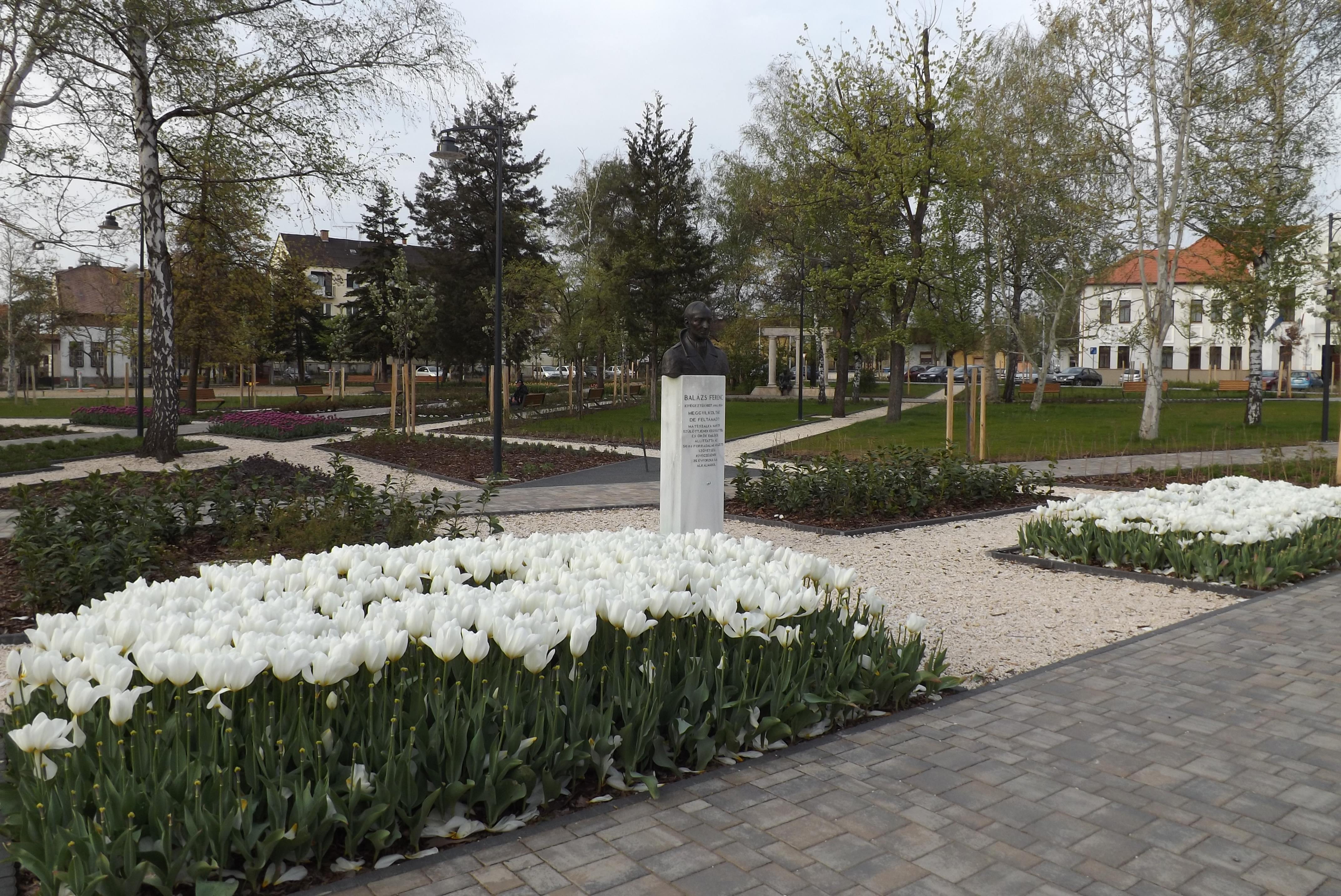 Balázs Ferenc emlékműve Mátészalkán